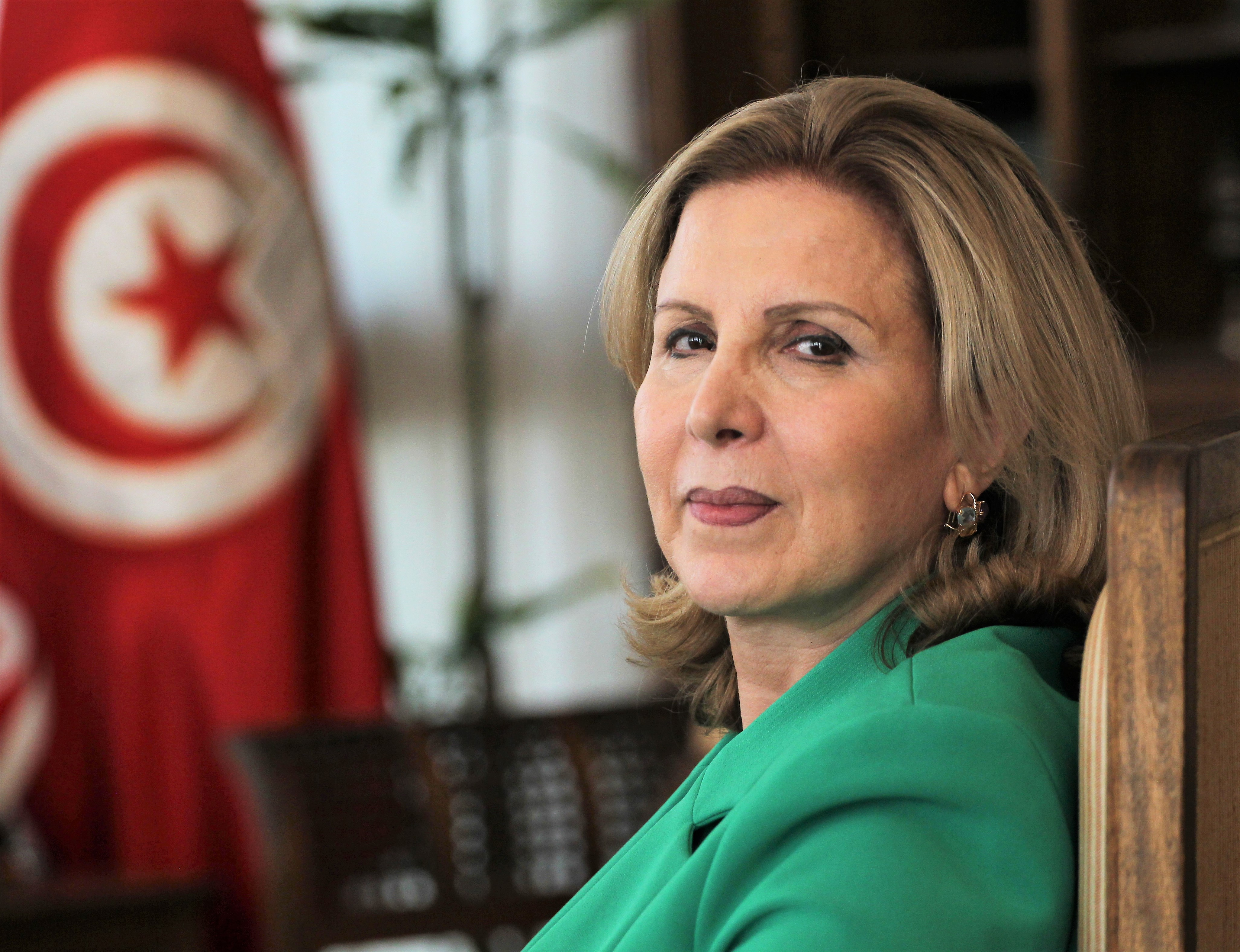 portrait selma elloumi rekik